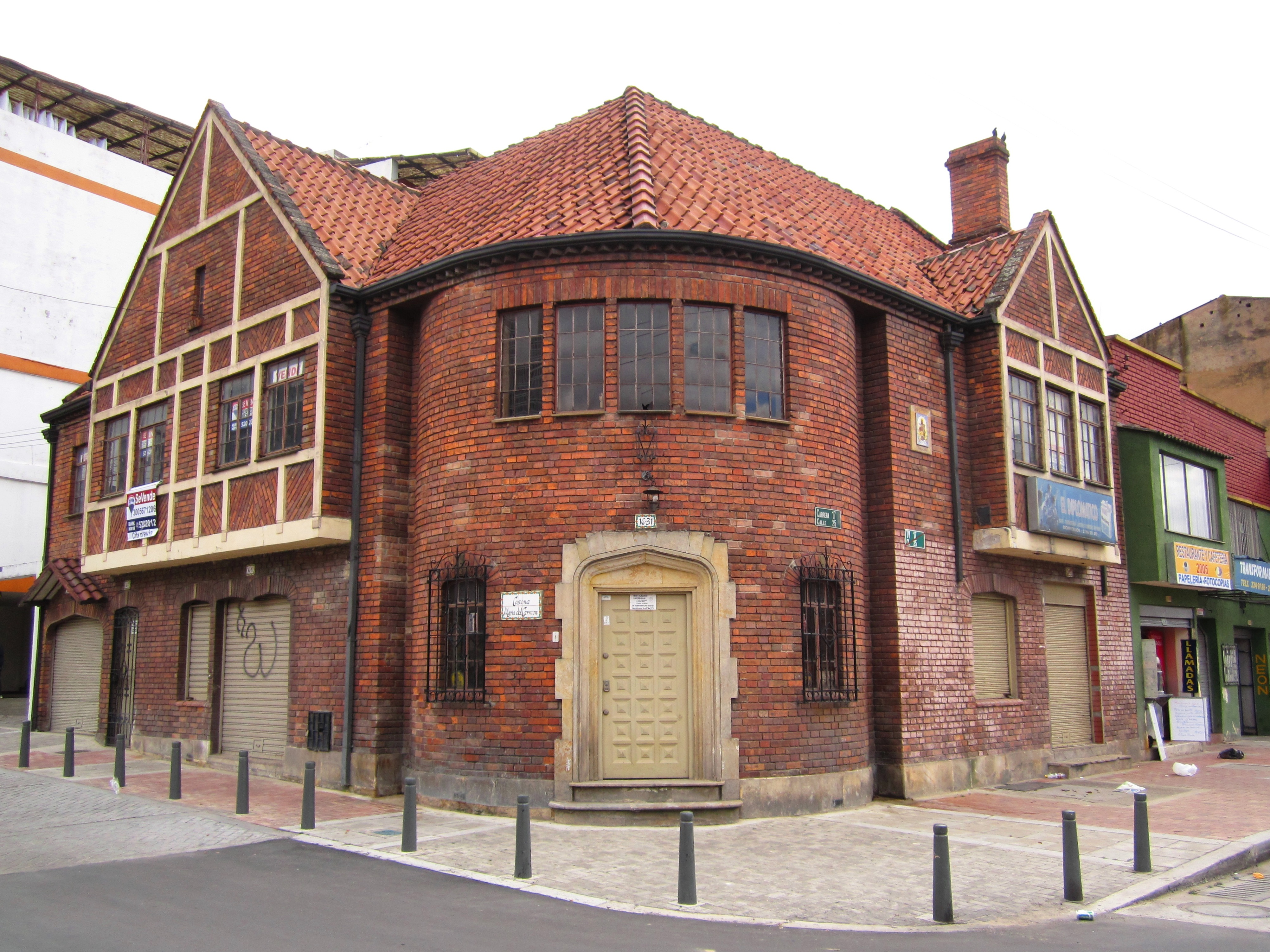 Bogotá carrera 17 calle 25 barrio Santa Fe